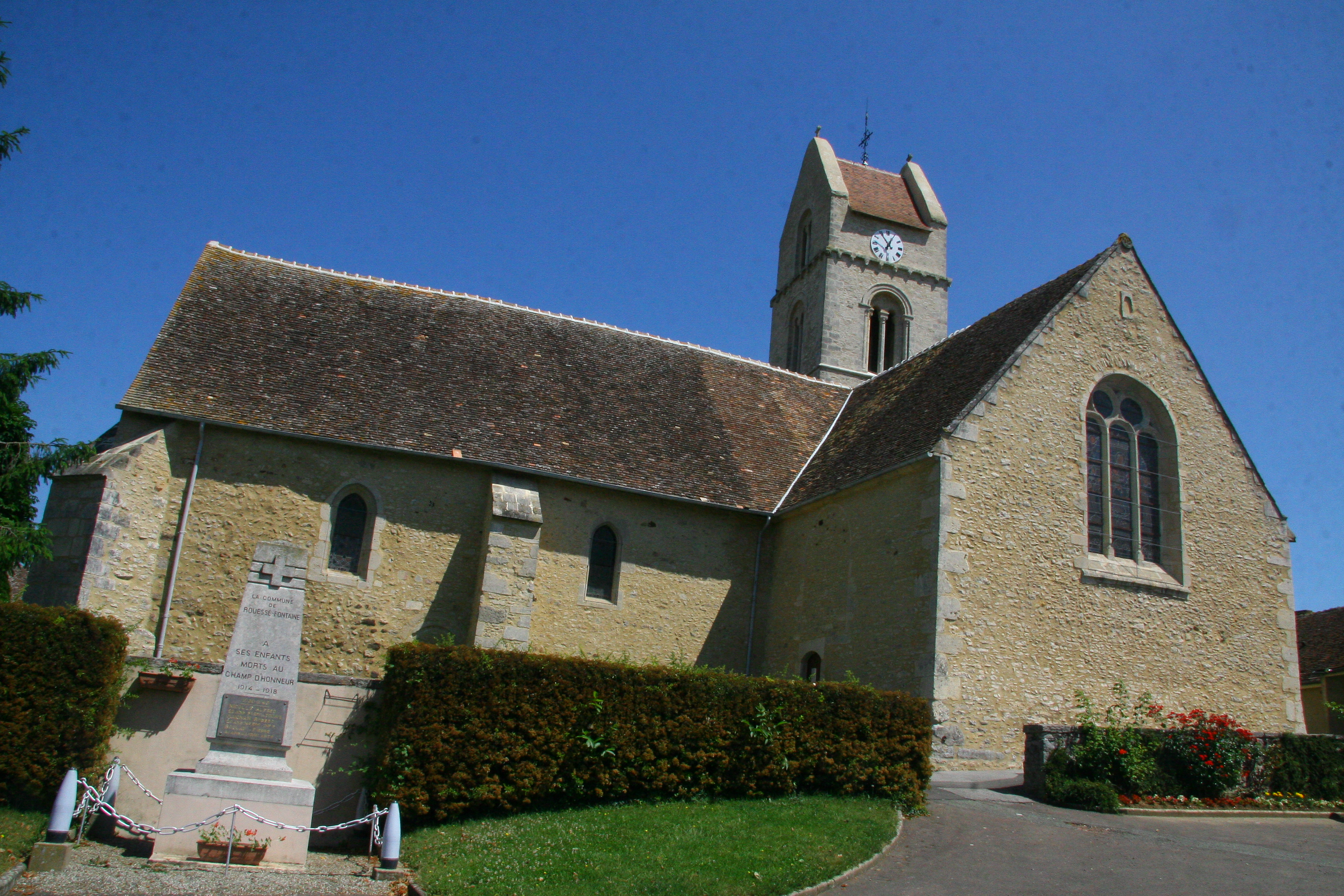 Église Saint-Hermès de Rouessé-Fontaine, Sarthe, Pays de la Loire, France La nef romane (du XIIe siècle) est appareillée en arête-de-poisson